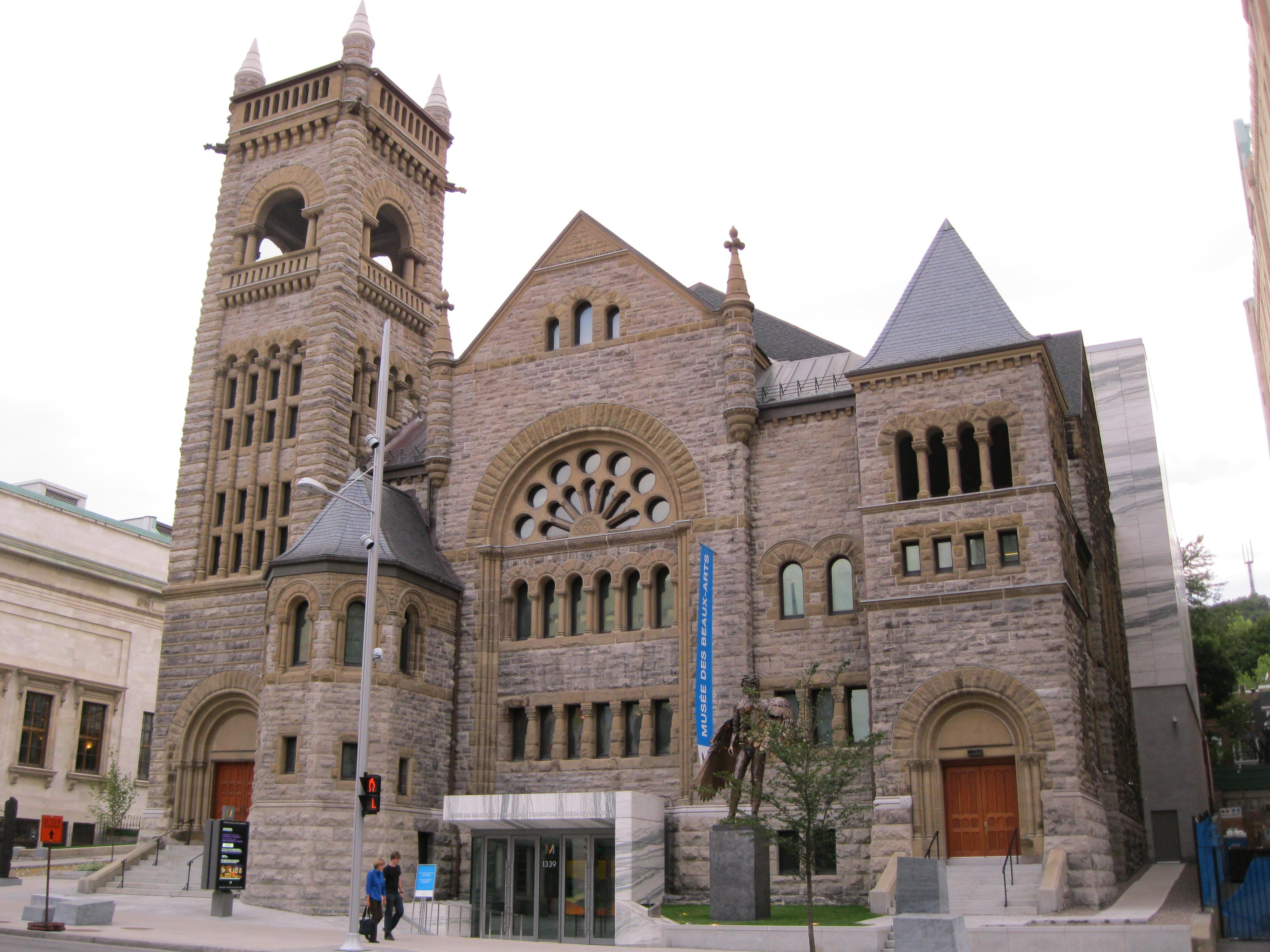 Musée des beaux-arts de Montréal